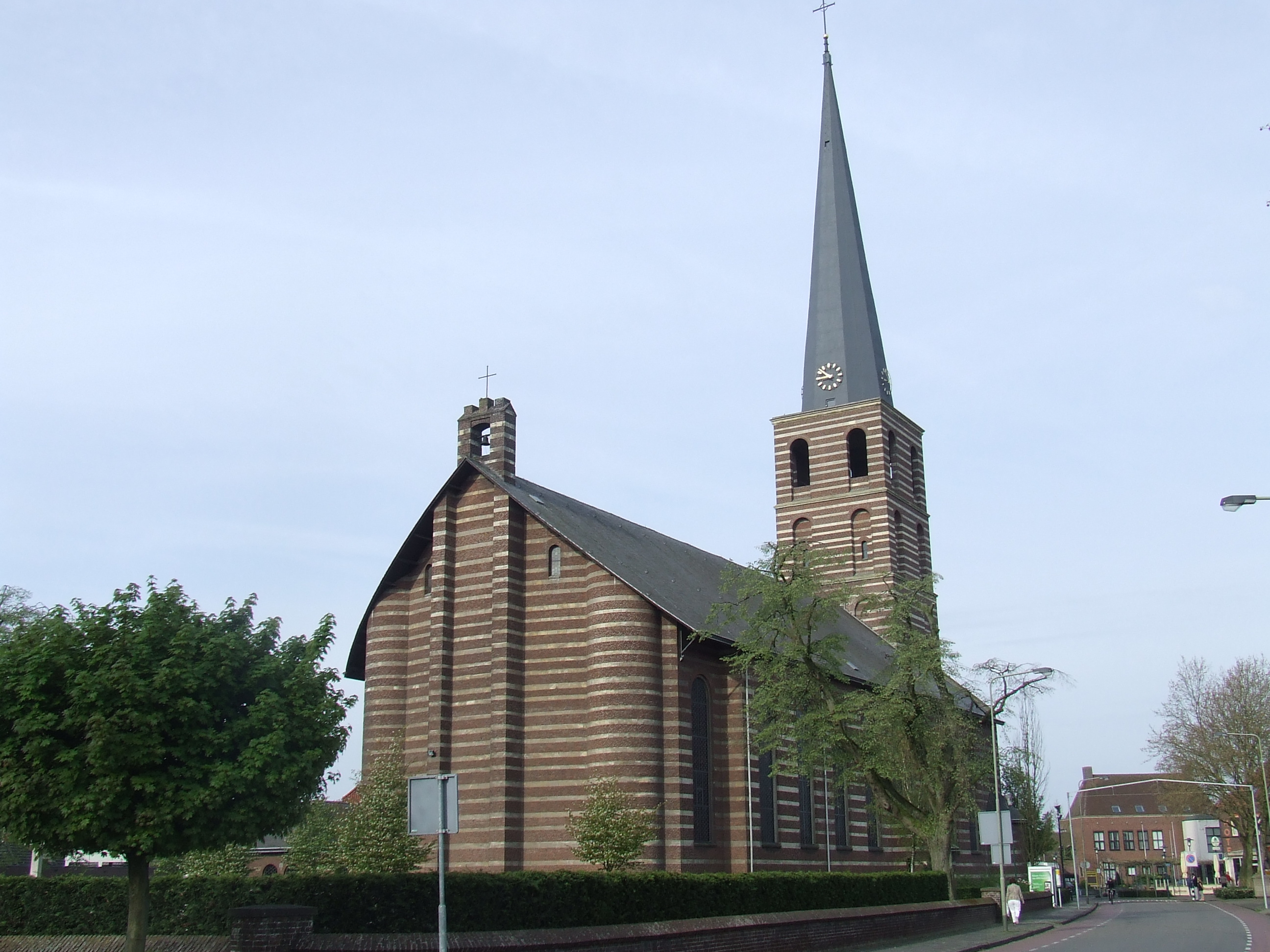 Sint-Nicolaaskerk Meijel